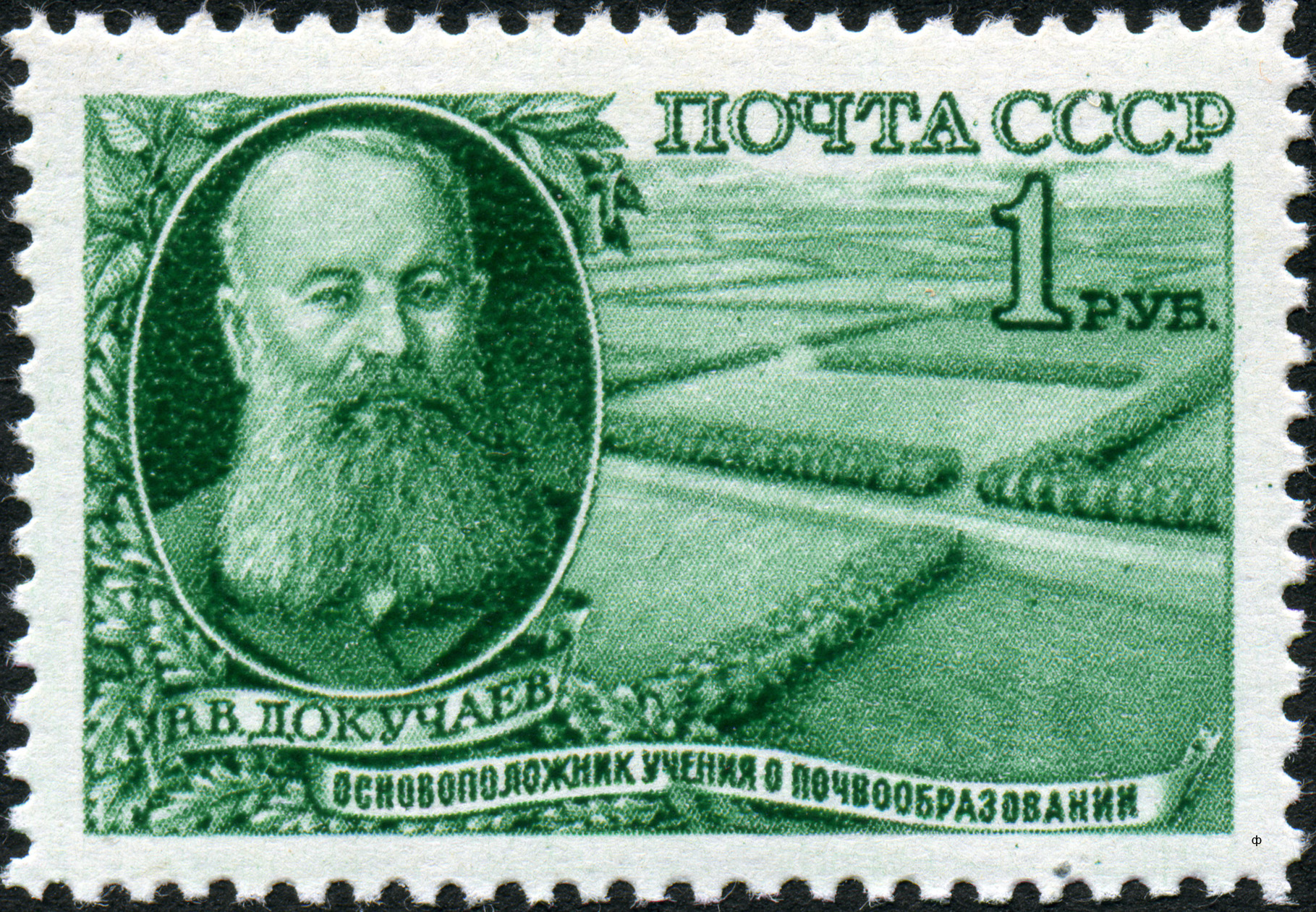 Марка СССР Vasily Vasili'evich Dokuchaev (Russian: Васи́лий Васи́льевич Докуча́ев) (1845 – 1902) Russian geographer who is credited with laying the foundations of soil science